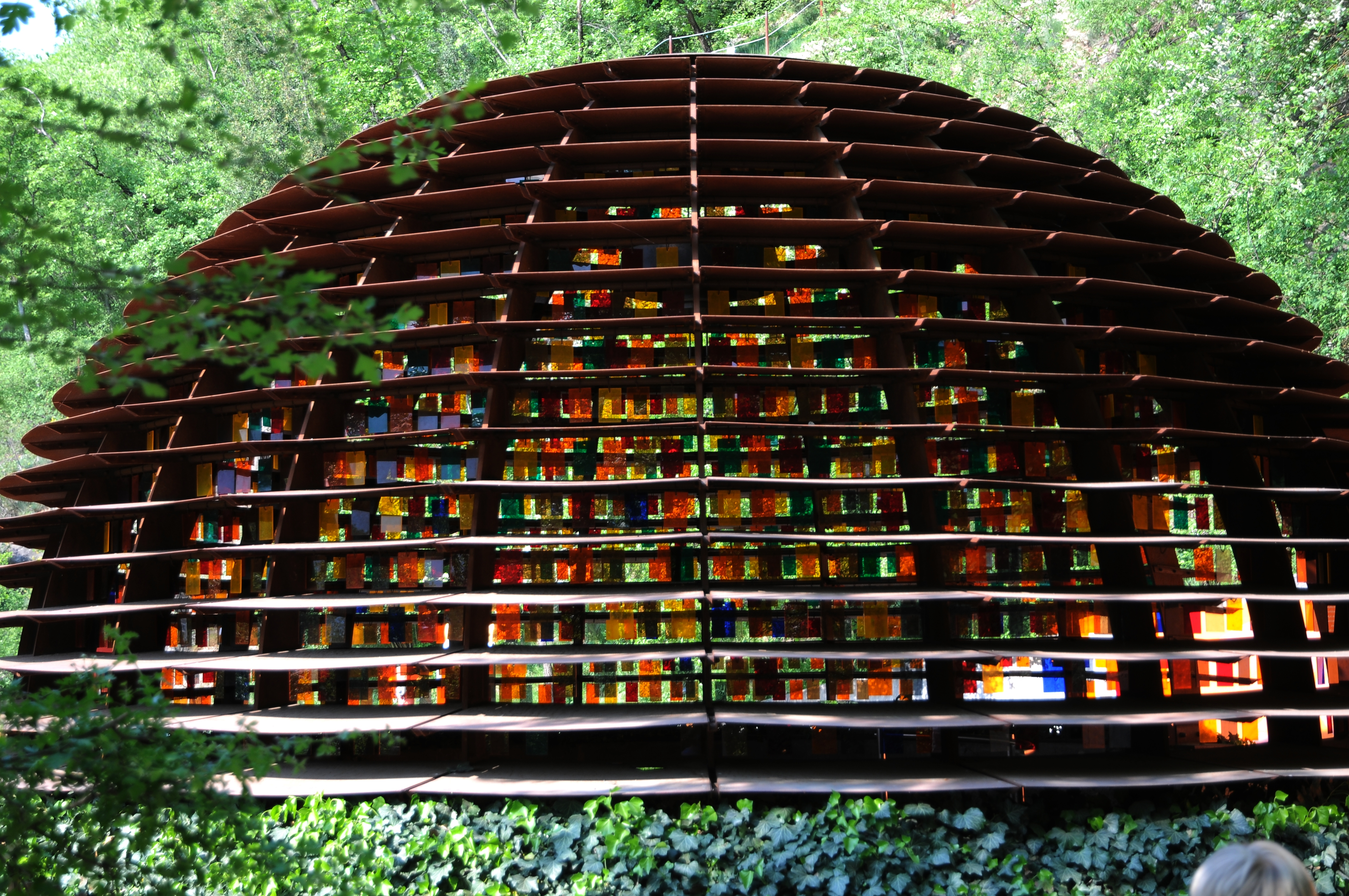 Die Gärten von Schloss Trauttmansdorff liegen am östlichen Stadtrand von Meran in Südtiro /Italien. Der nach seinem Wahrzeichen – Schloss Trauttmansdorff – benannte botanische Garten der Kurstadt Meran nimmt eine Fläche von rund zwölf Hektar ein.